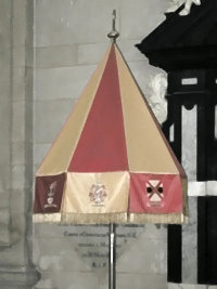 Conopeum van de Sint-Servaasbasiliek (eigen foto)